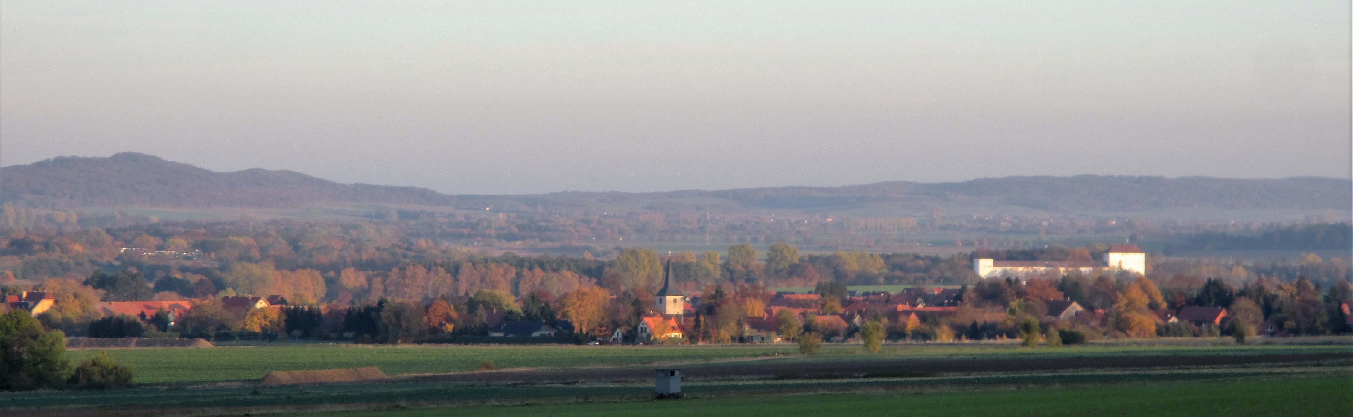 Blick vom Ostrand des Hainbergs auf Sehlde, Landkreis Wolfenbüttel